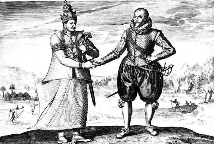 Spilbergen meeting king Vimaladharmasoorya of Kandy, 1602.